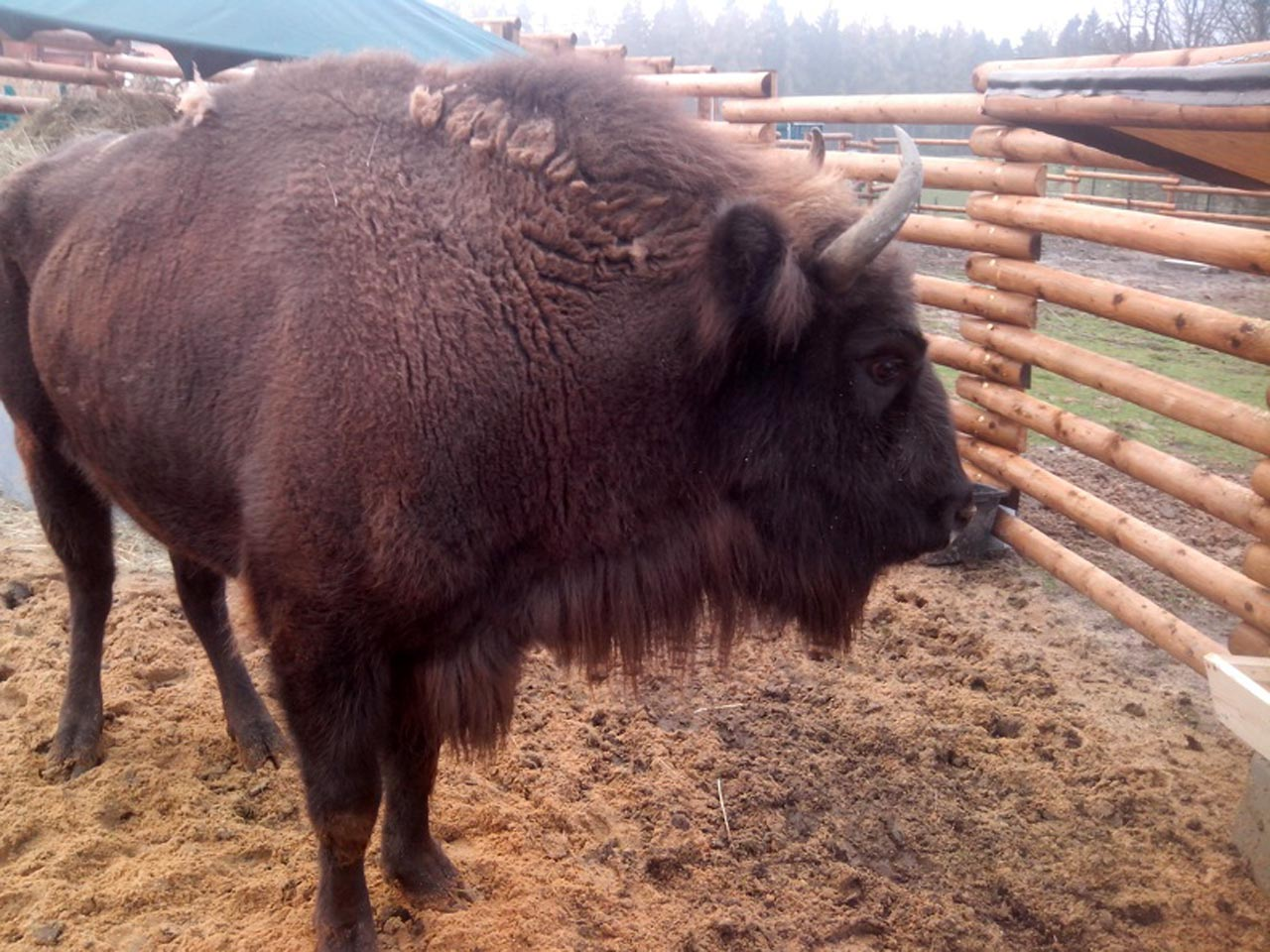 Zubr evropský Zoo Tábor